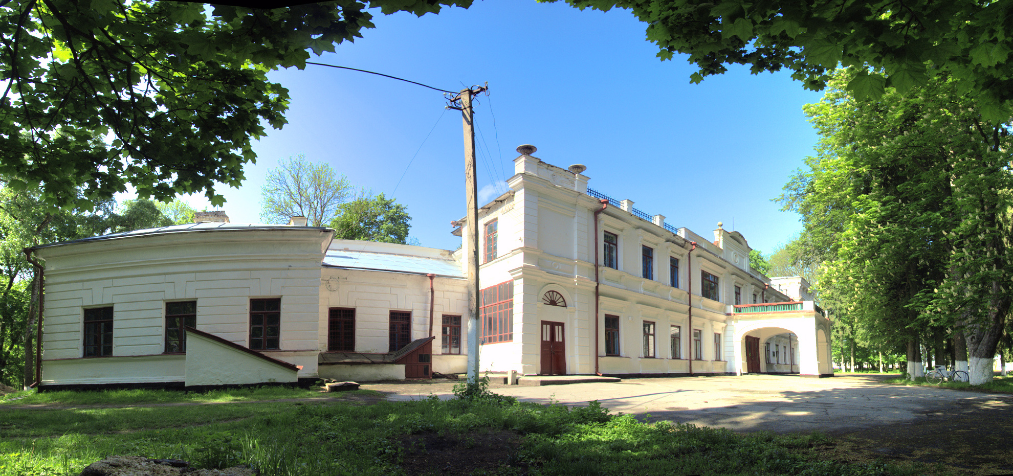 Новочорторийський, Любарський р-н, с. Нова Чортория